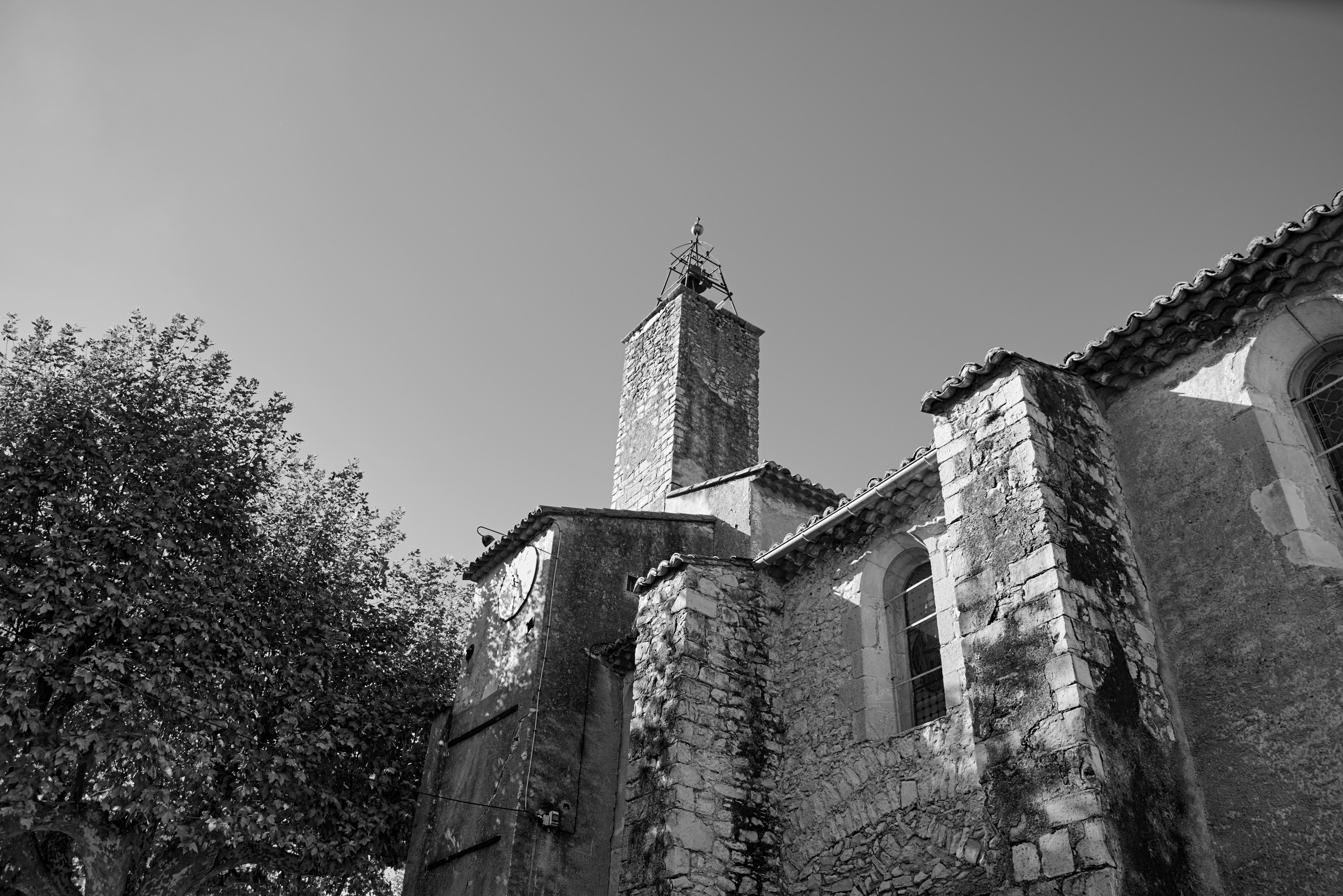 Église Saint-Faustin-et-Saint-Jovite à Quissac, dans le département du Gard (région Occitanie)